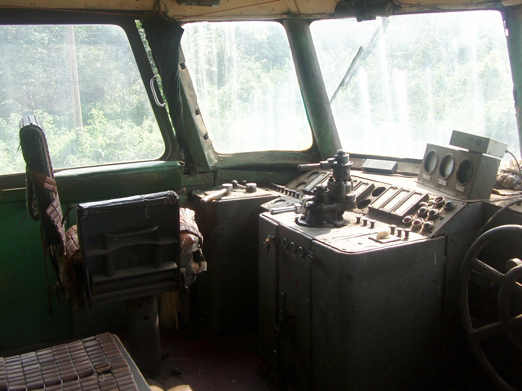 东风型内燃机车的驾驶室